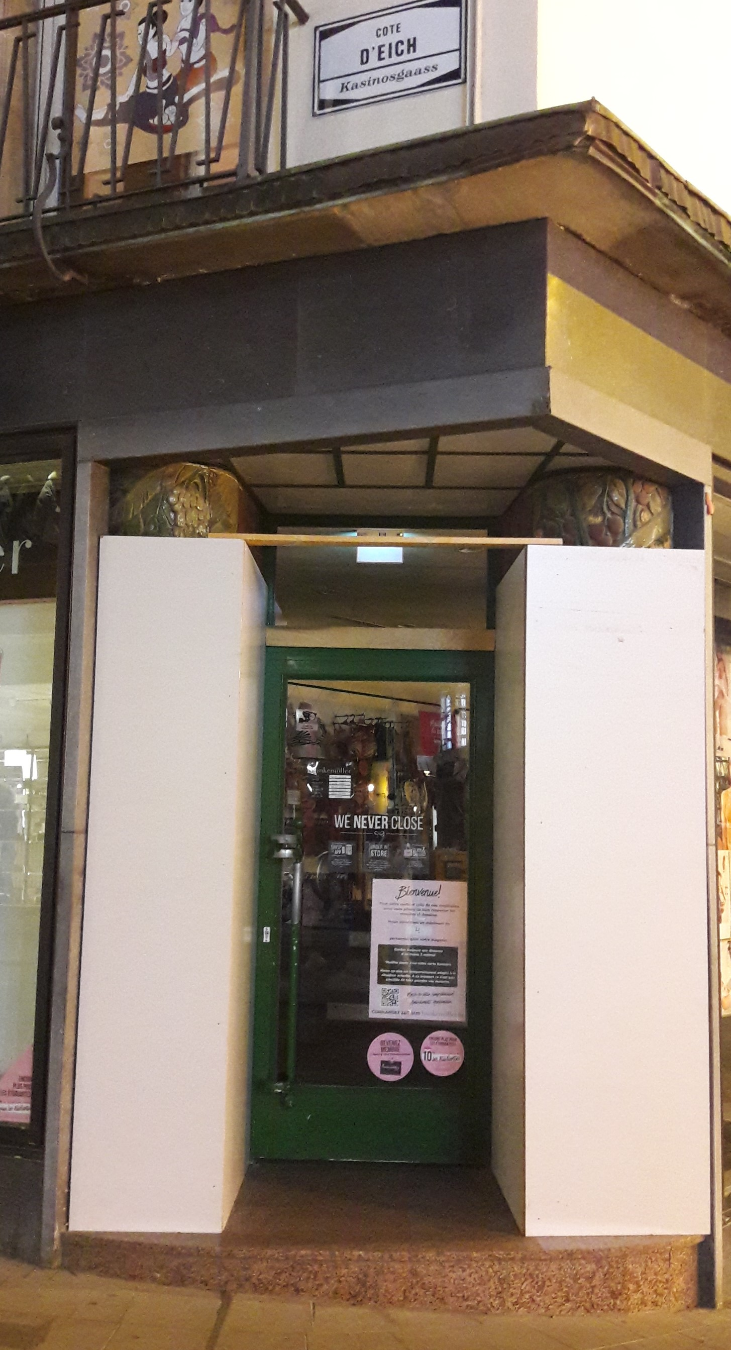 Déi zwou Keramiken, déi zanter dem 8. Mee 2009 um Inventaire supplémentaire des immeubles et objets classés stinn, goufen am Juli 2020 ofgedeckt. D'Gerücht, datt dëst am Kontext vum Doud vum George Floyd geschitt wier, huet d'Pressespriecherin vum der Stad Lëtzebuerg net bestätegt, mä de Stroossenaarbechten derniewent erkläert.